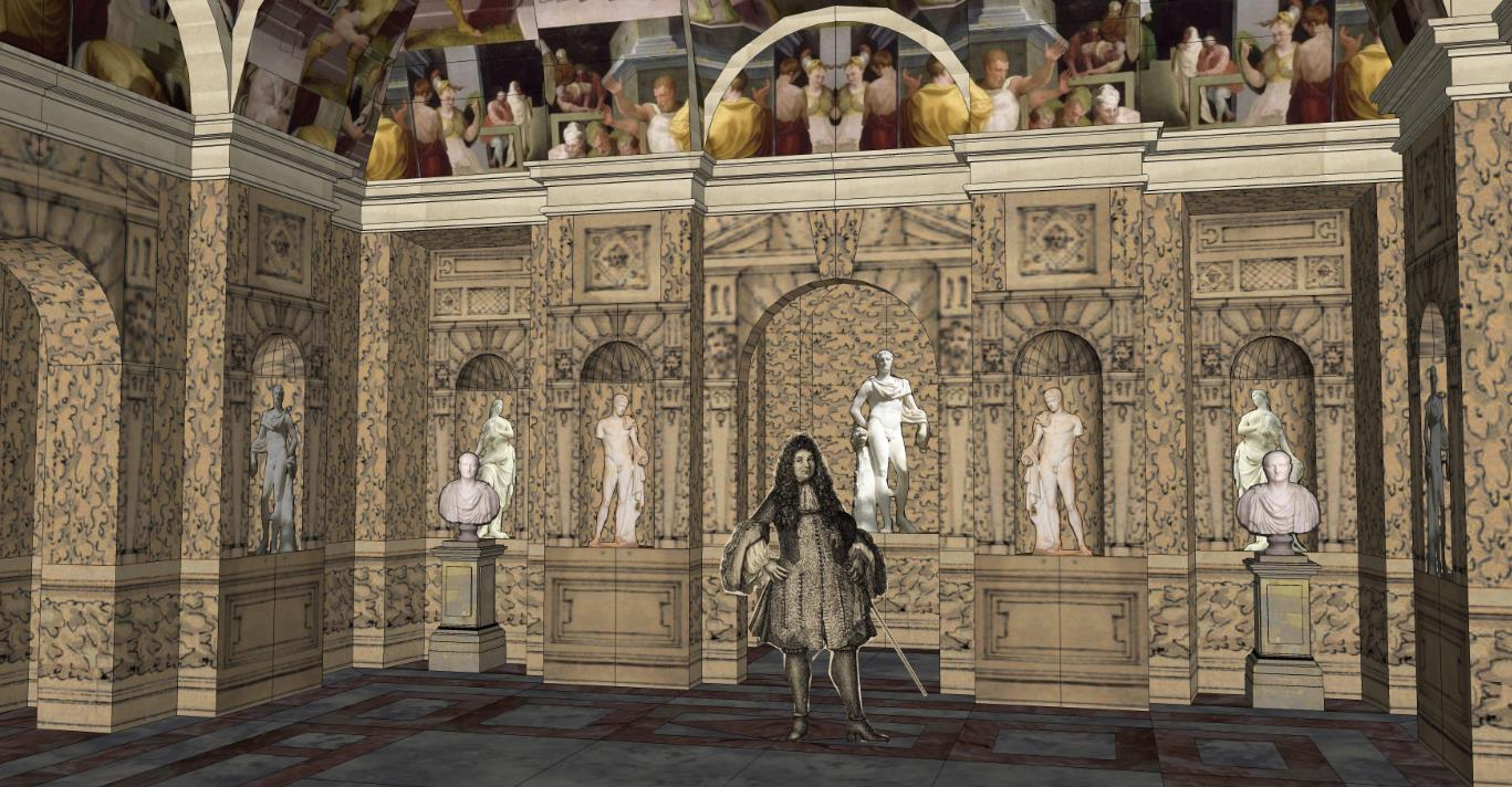 Schéma de l'intérieur de la Grotte de Meudon.